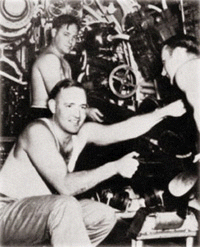 CDR Slade Cutter aboard submarine